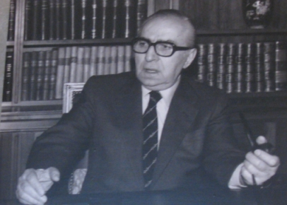 From the "The Greek Parliament Building" permanent exhibition. Greek Parliament Building. Athens, Greece. --- Ιωάννης Αλευράς Από τη Μόνιμη Έκθεση "Το Κτίριο της Βουλής των Ελλήνων". Βουλή των Ελλήνων, Αθήνα.